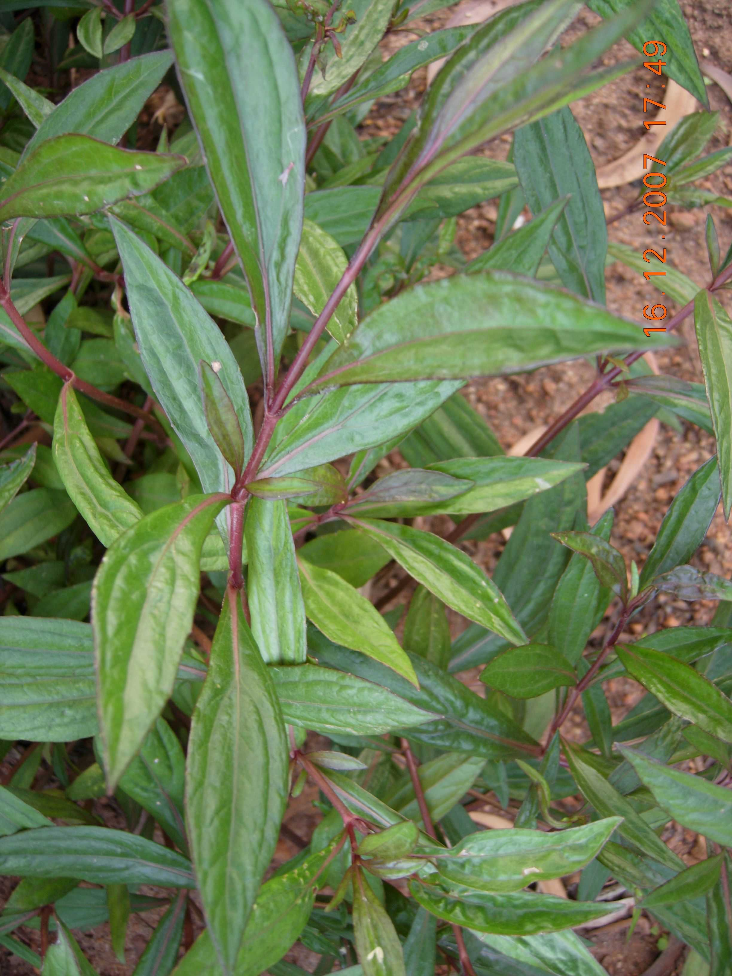 അയ്യപ്പന